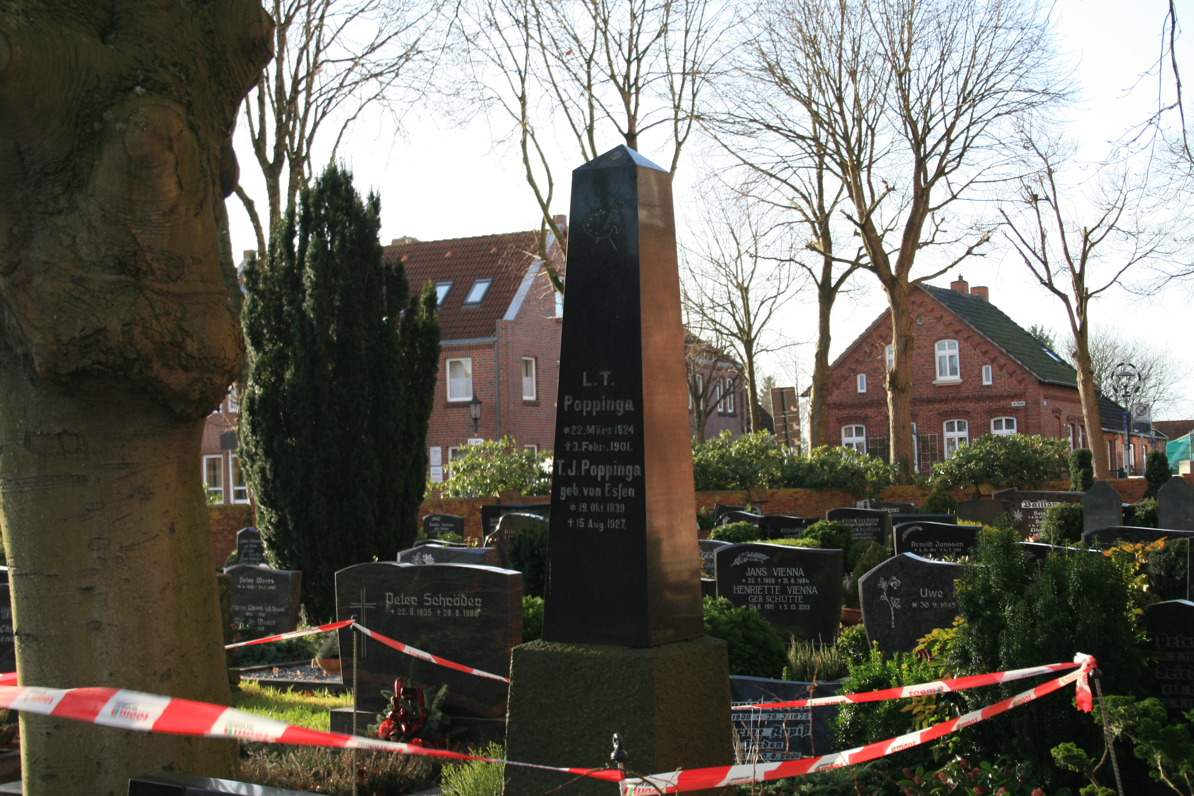 Obelisk des Grabes von Leffert Thelen Poppinga auf dem Friedhof in Marienhafe